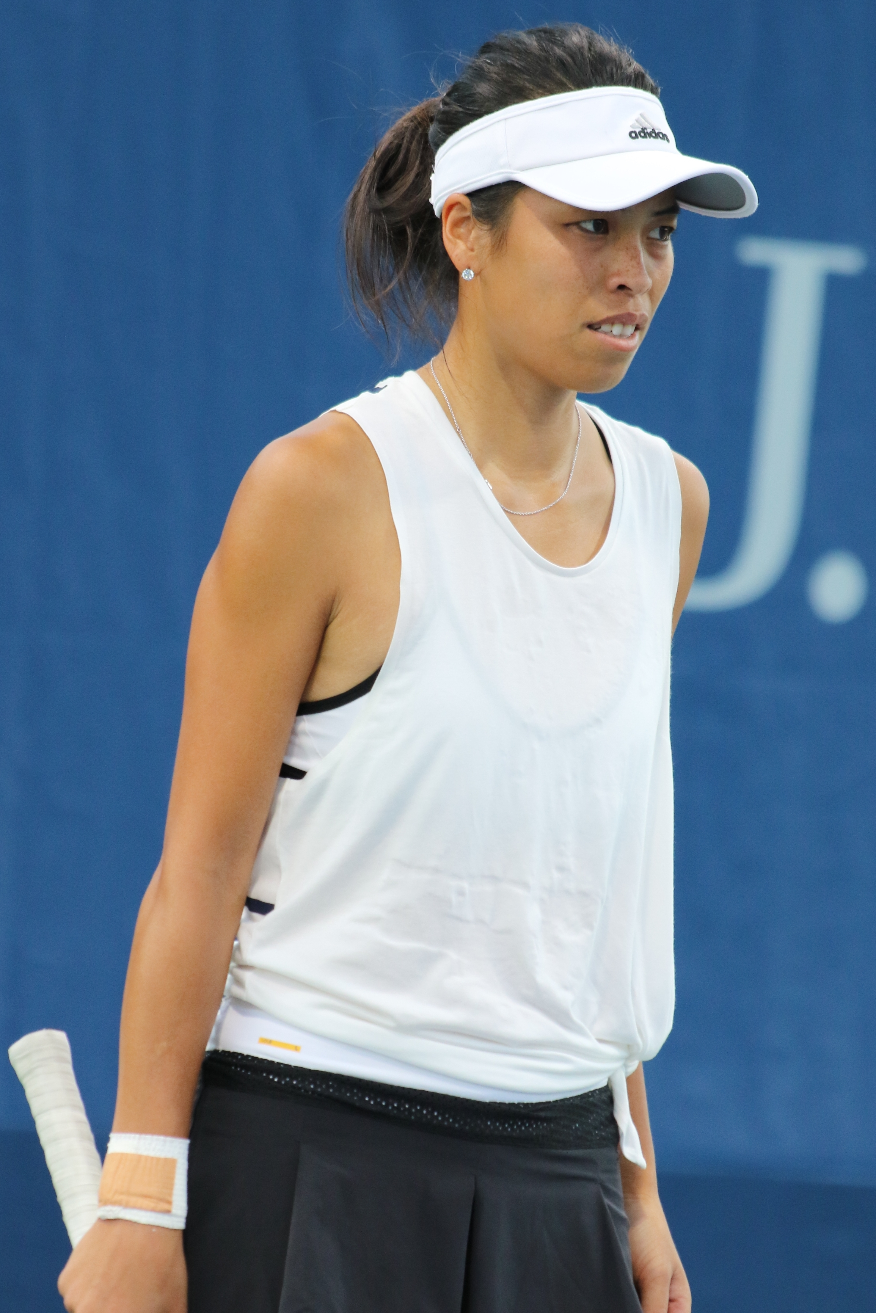 Hsieh US16 (9)